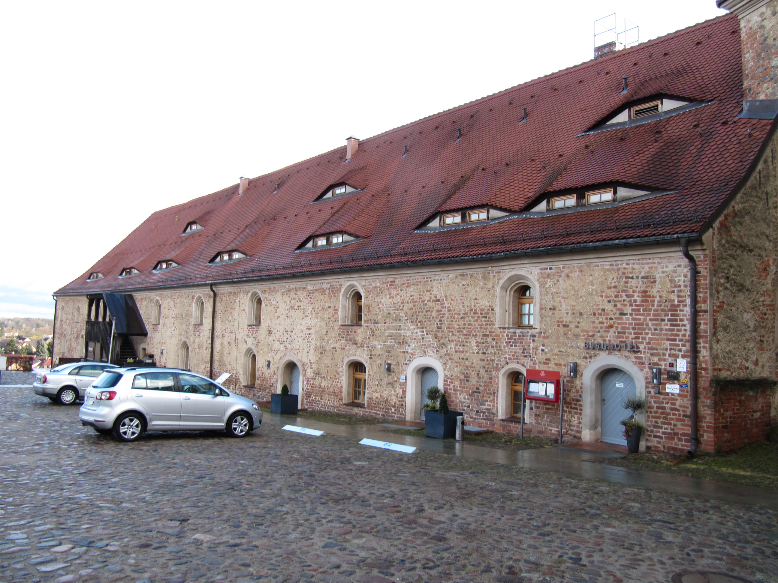 salzmagazin burg eisenhardt